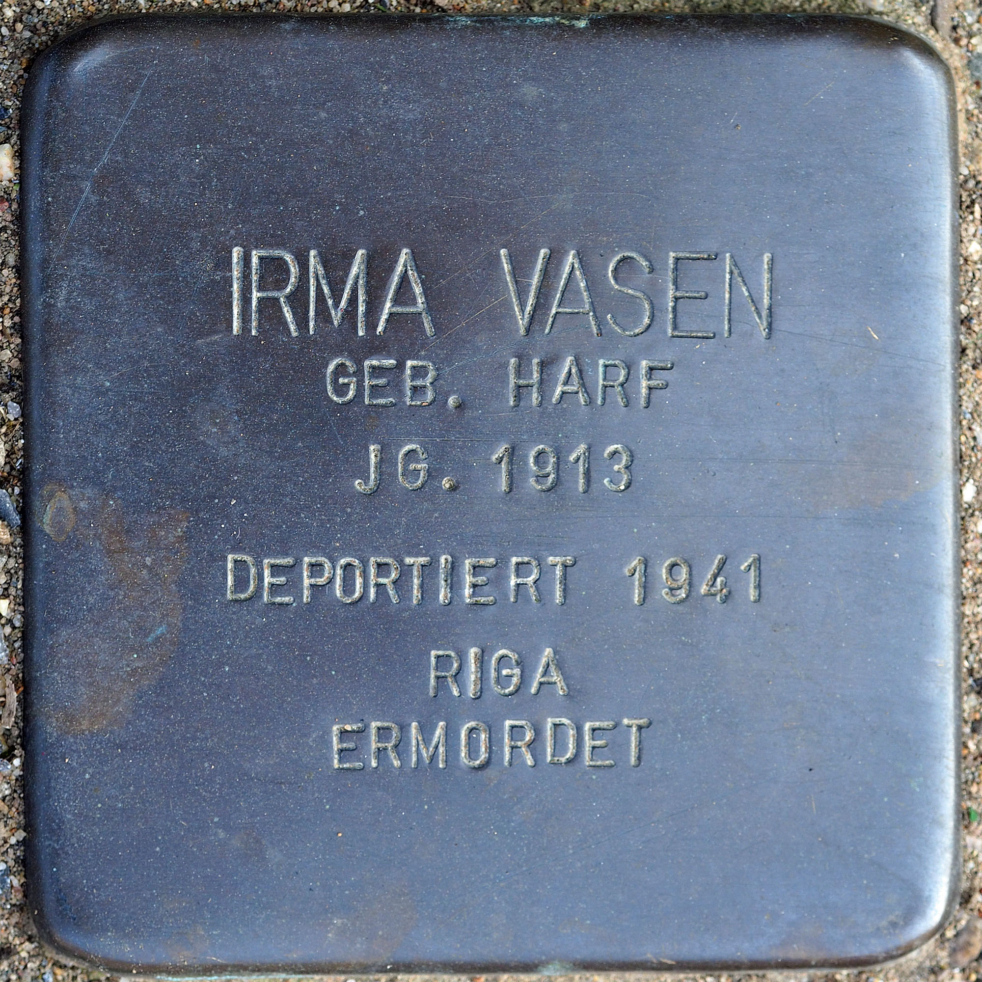 Stolpersteine GV: Vasen, Irma